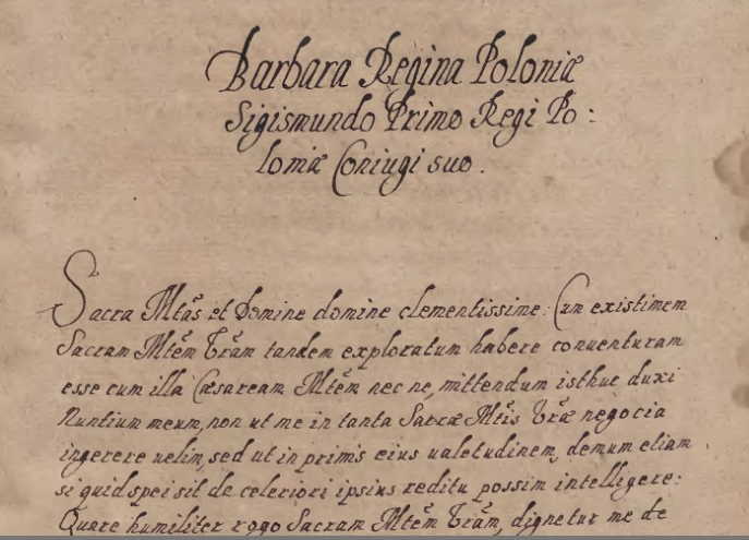 Początek odpisu listu królowej Barbary Zapolyi do męża Zygmunta Starego z roku 1515 (Acta Tomiciana. Tom III obejmujący odpisy akt politycznych, listów, wierszy dotyczących dziejów Polski za panowania Zygmunta I Starego z lat 1514-1515)